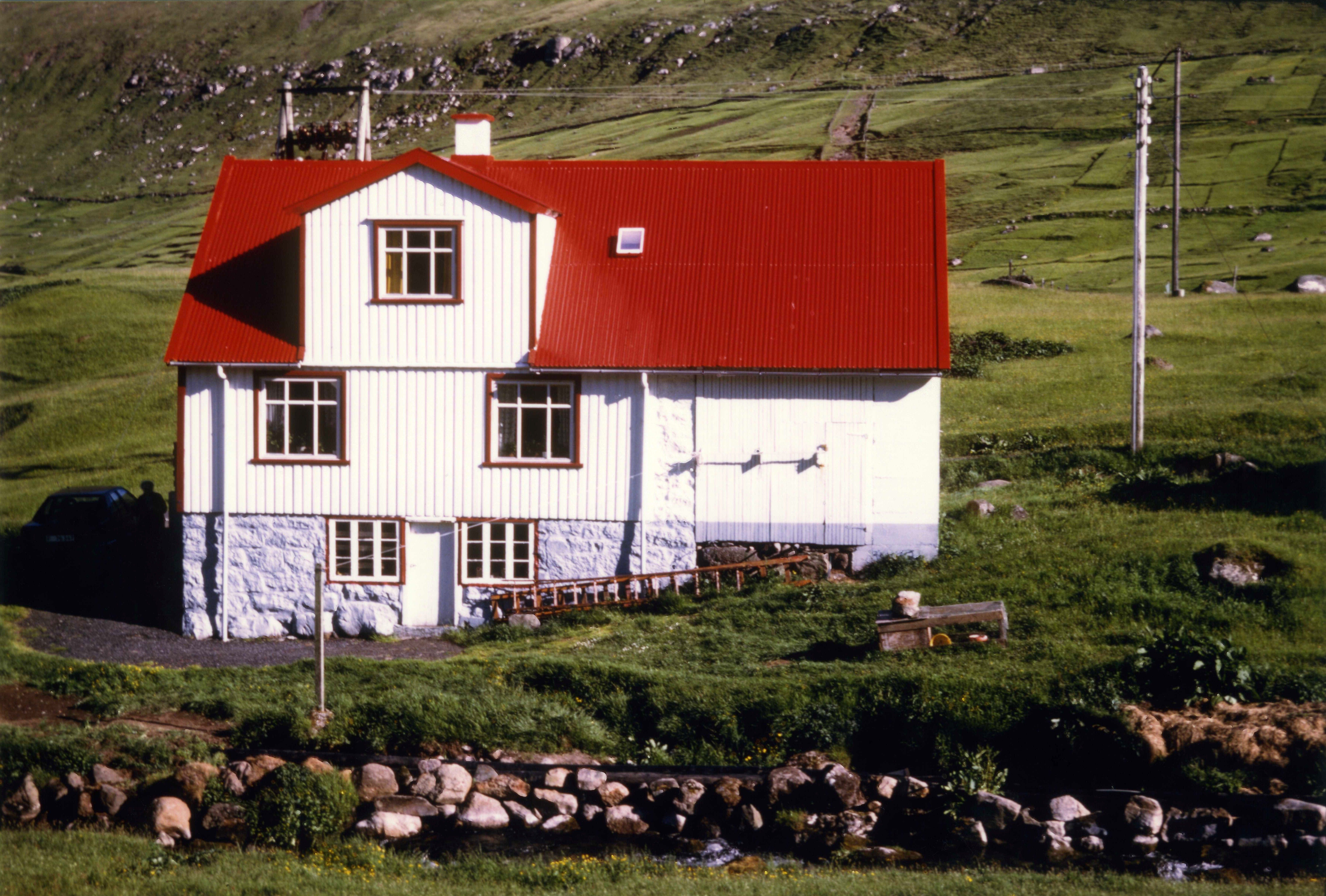 Une maison du village de Gjógv situé dans Eysturoy. Cette maison aux murs partiellement bardés de bois possède un toit à deux pans inclinés. Dans ce toit une grande lucarne (Zwerchhaus) a été construite afin de disposer de place supplémentaire dans les combles aménagés. La toiture est constituée de plaques de tôle ondulée peintes en rouge afin de donner une touche de gaîté dans un environnement de beauté austère. Gjógv signifie "ravin" et Eysturoy "Île de l' Est". Gjógv, Eysturoy, Îles Féroé.